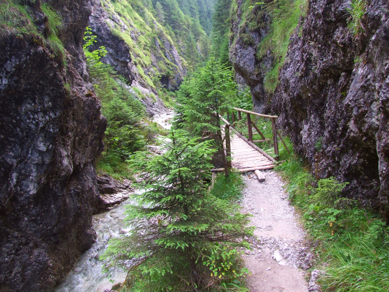 Wąwóz Cieśniawa w Dolinie Juraniowej w słowackich Tatrach Zachodnich